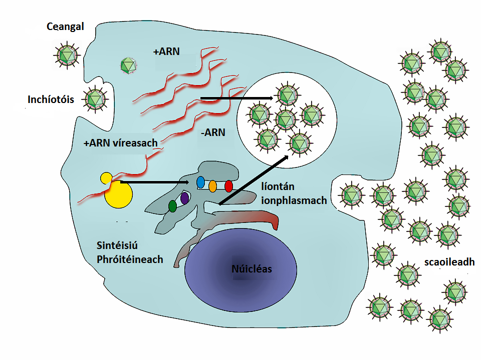 Víreas